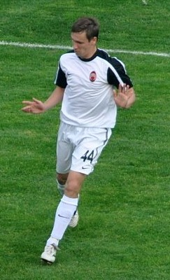 Сергей Силюк — украинский футболист.